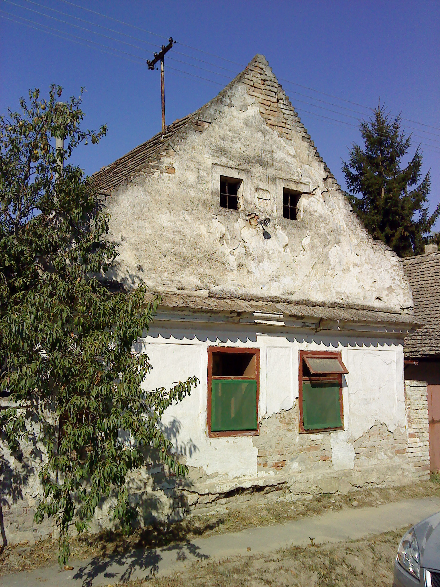 Kopács, 1840-ben épült házHrvatski: Kopačevo, kuća iz 1840. godine